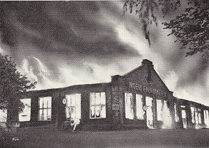 Fra brannen ved NOBØ Fabrikker i Trondheim i 1949.